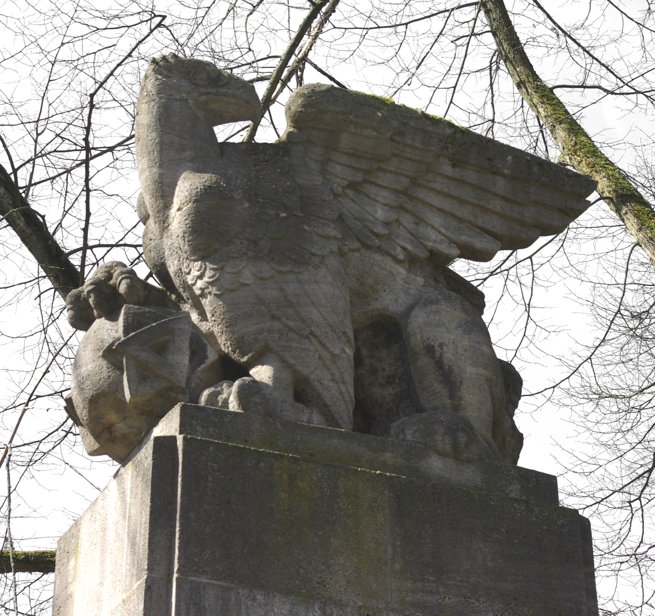 Kriegerdenkmal für die jüdischen Gefallenen im Ersten Weltkrieg (1920/22) von Fritz Landauer auf dem Neuen Jüdischen Friedhof in Nürnberg